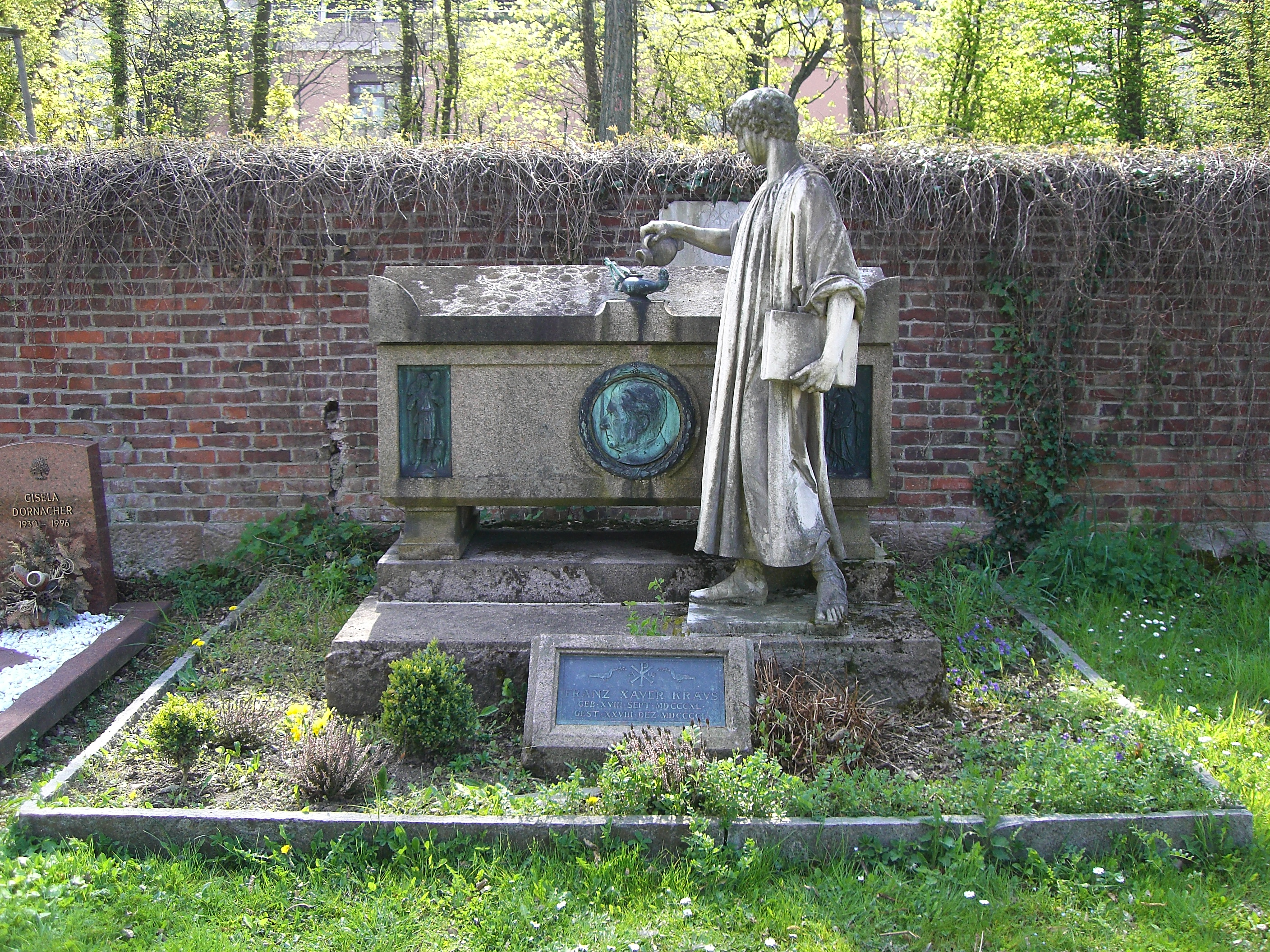 Franz Xaver Kraus (* 18. September 1840 in Trier; † 28. Dezember 1901 in San Remo)